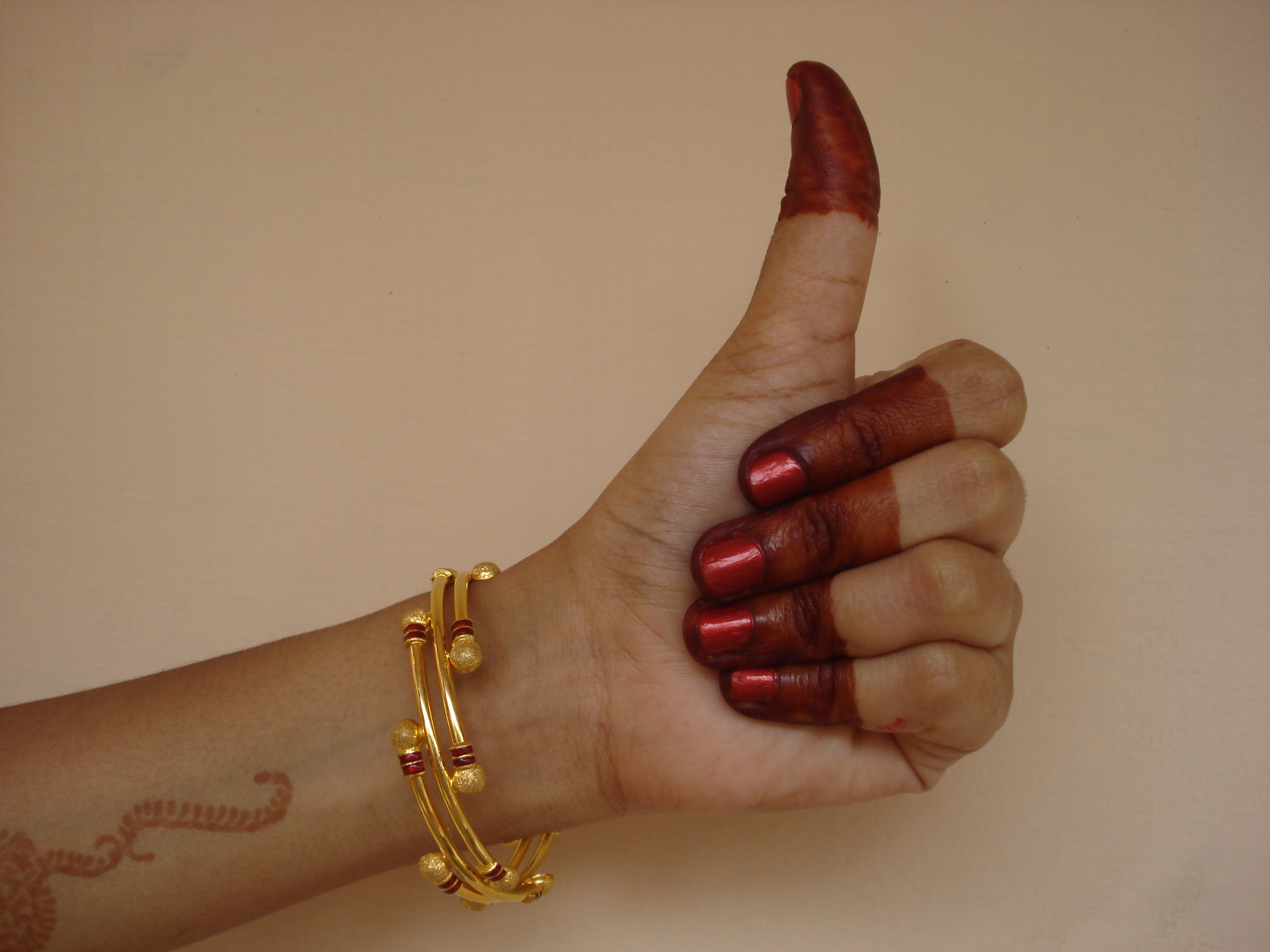 ശിഖര ഹസ്തം